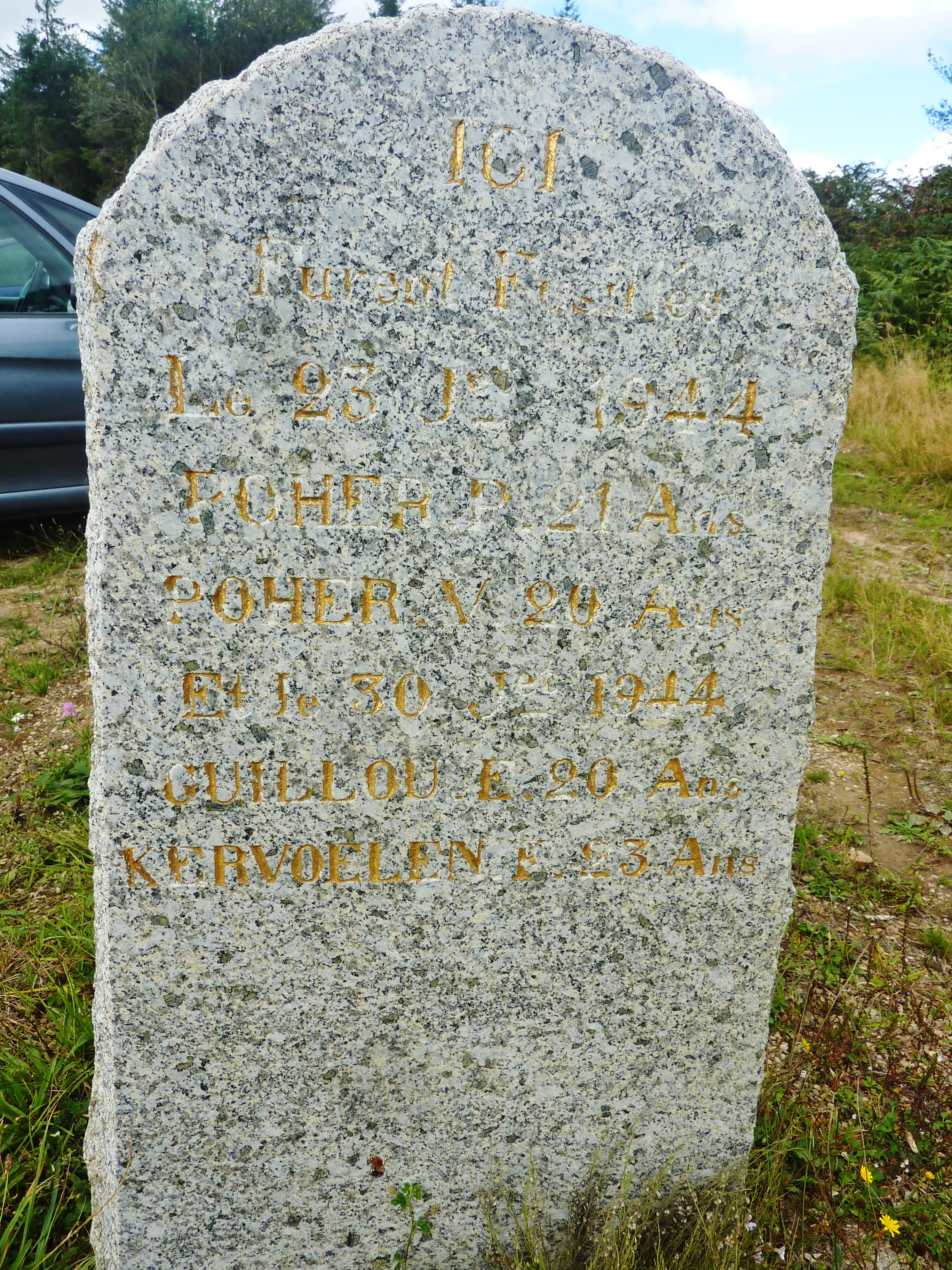 Scrignac : stèle commémorative placée au lieu (entre la D 42 et Pen ar Garront) où 4 résistants furent fusillés (deux le 23 juillet 1944 : P. Poher, 21 ans et V. Poher, 20 ans (ils demeuraient à Plévin) ; et deux le 30 juillet 1944 : Édouard Guillou, 20 ans et François Kervoëlen, 23 ans).